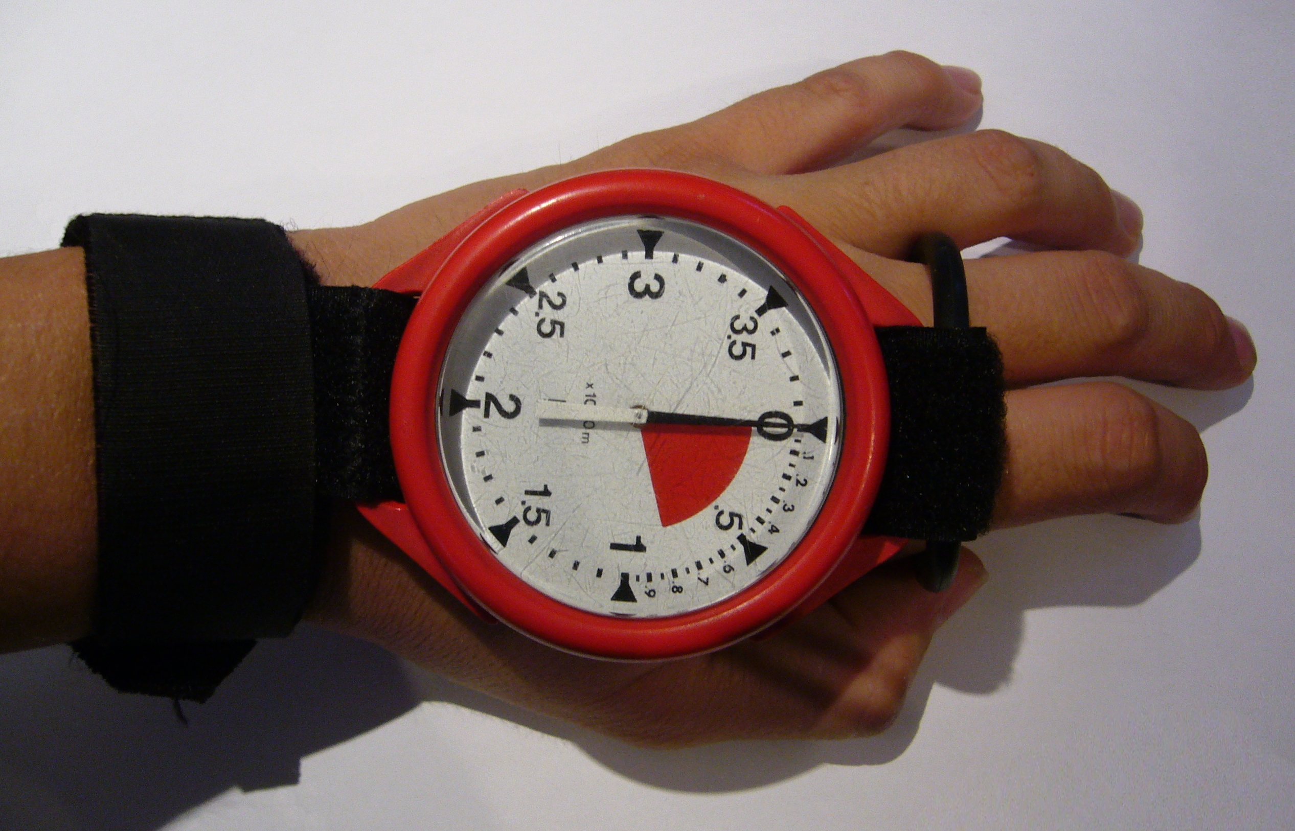 Ein Höhenmesser der Firma Ro mit 4000m-Skala am Handrücken mit Fingerring.